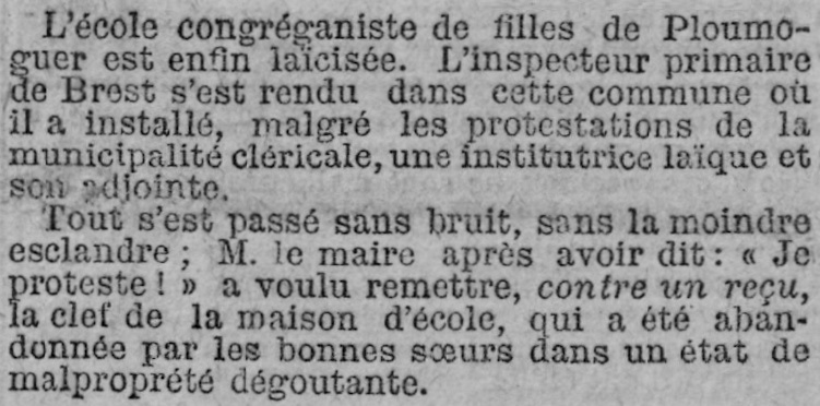 La nomination de deux institutrices laïques à l'école de Ploumoguer en remplacement de deux religieuses entraîne une proptestation du maire. (journal La Lanterne du 1er avril 1884).